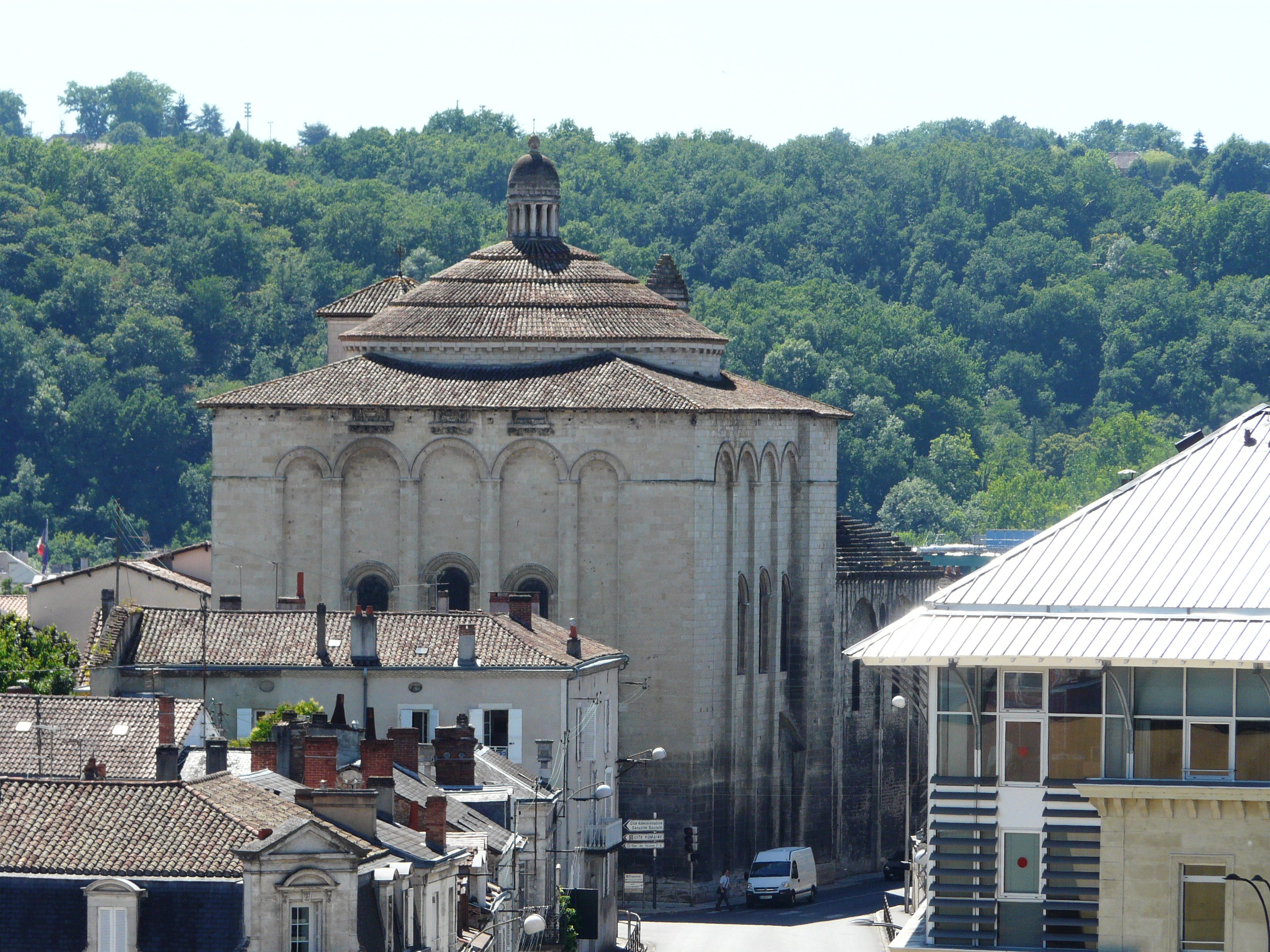 L'église Saint-Étienne-de-la-Cité vue depuis la tour Mataguerre, Périgueux, Dordogne, France.